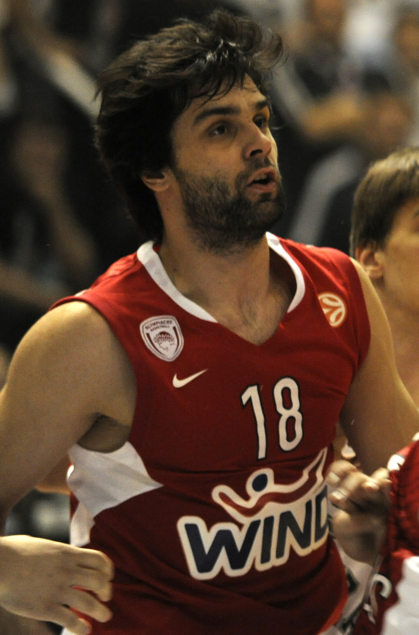 _DSC7085